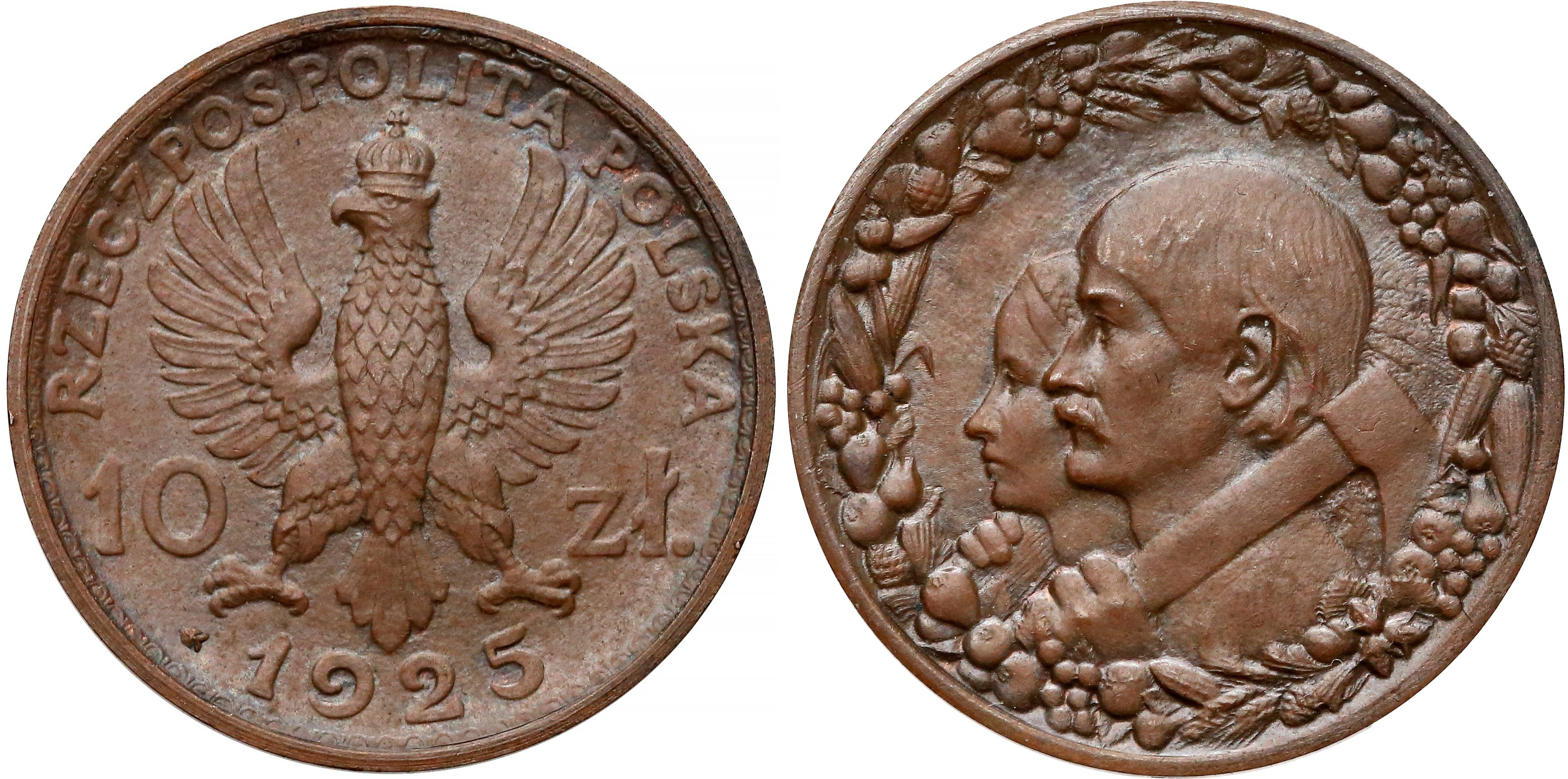 PRÓBA 10 złotych 1925 Głowy mężczyzny i kobiety ze znakiem mennicy brąz